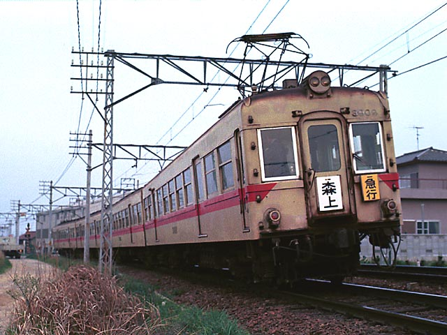 3900系3902編成。名鉄AL車最後の新造形式。名古屋本線知立 - 牛田間にて撮影。